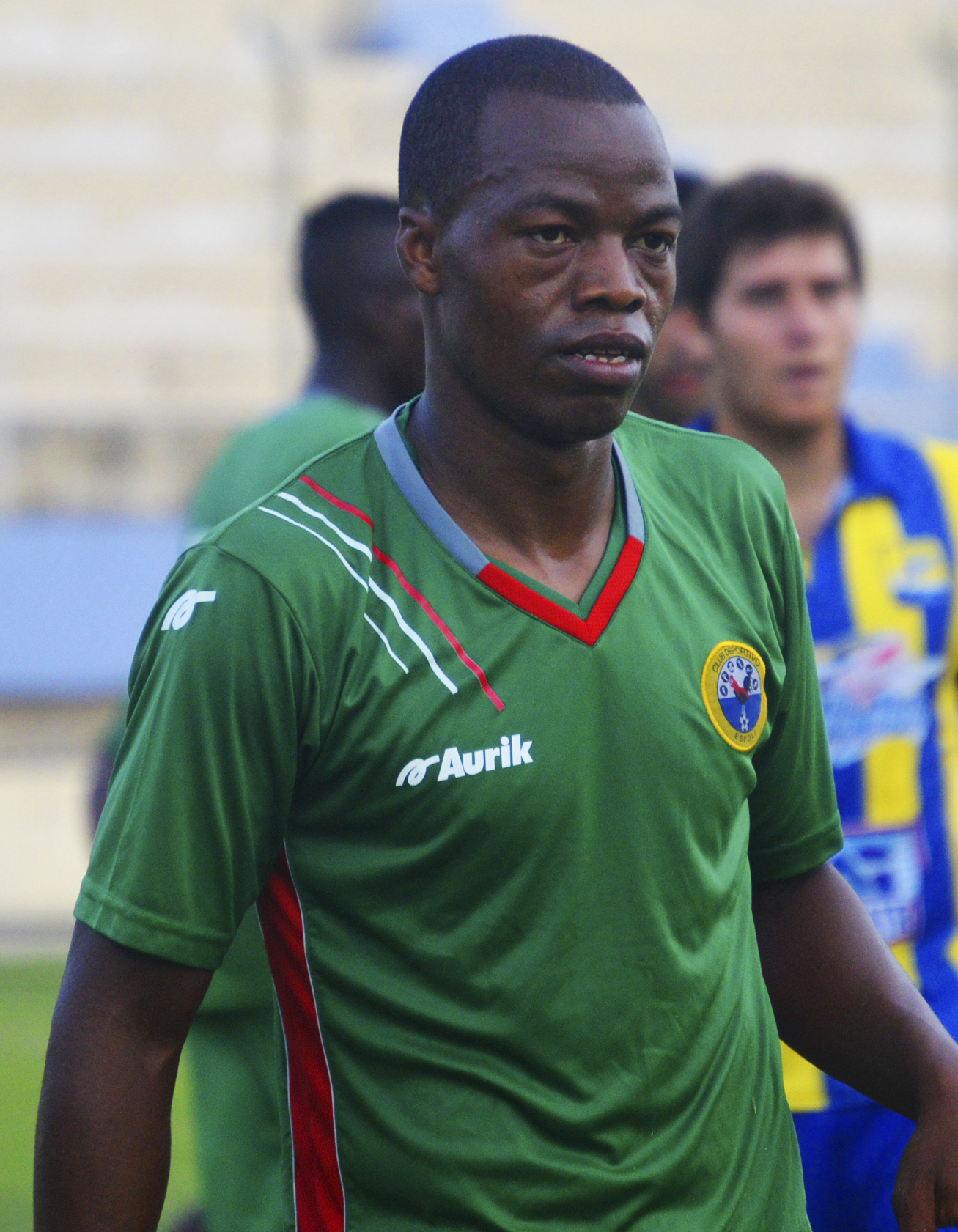 William Araujo jugando para Espoli en 2014